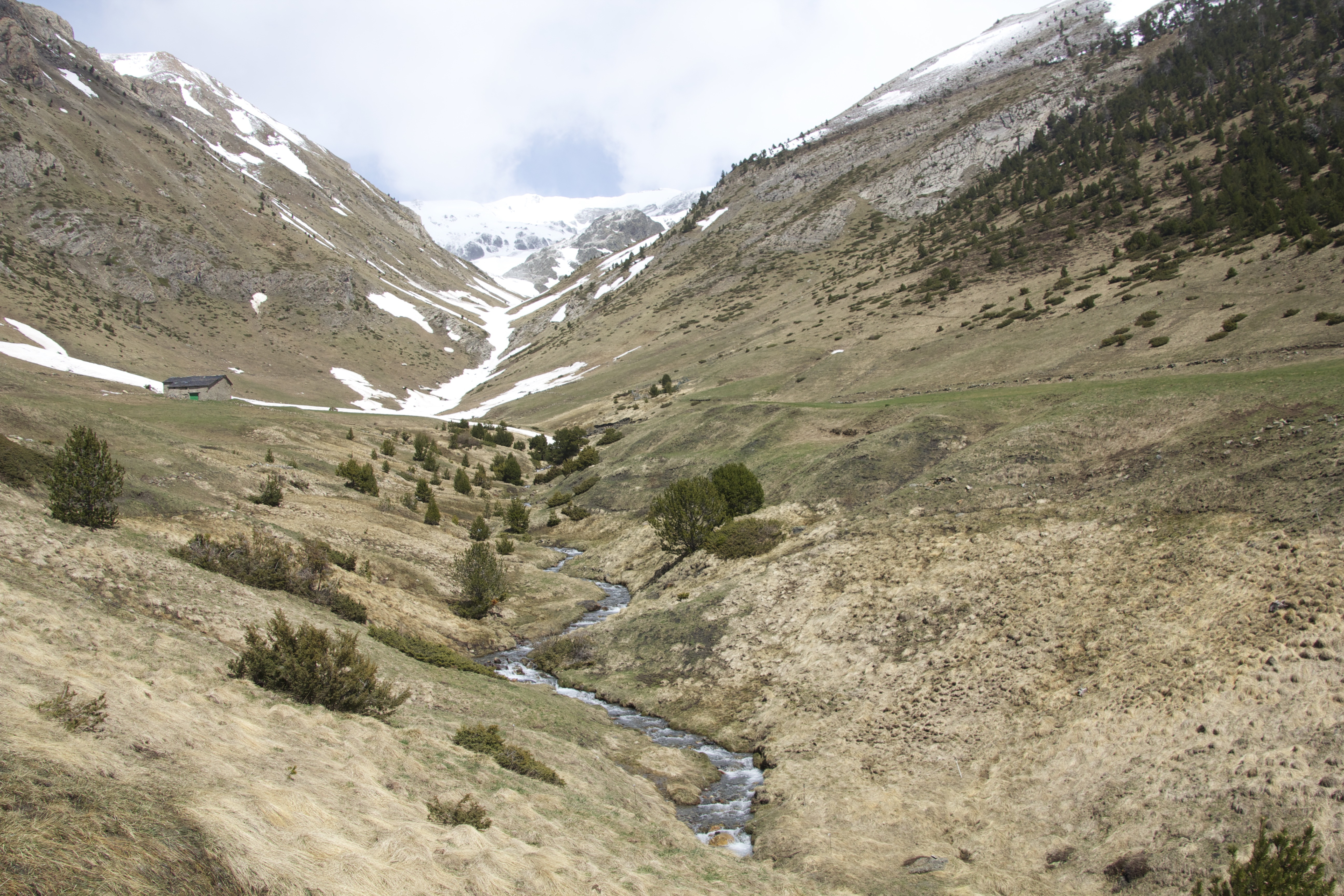 Riu de Montaup This is a a photo of a river in Andorra with id: IEA-R-29